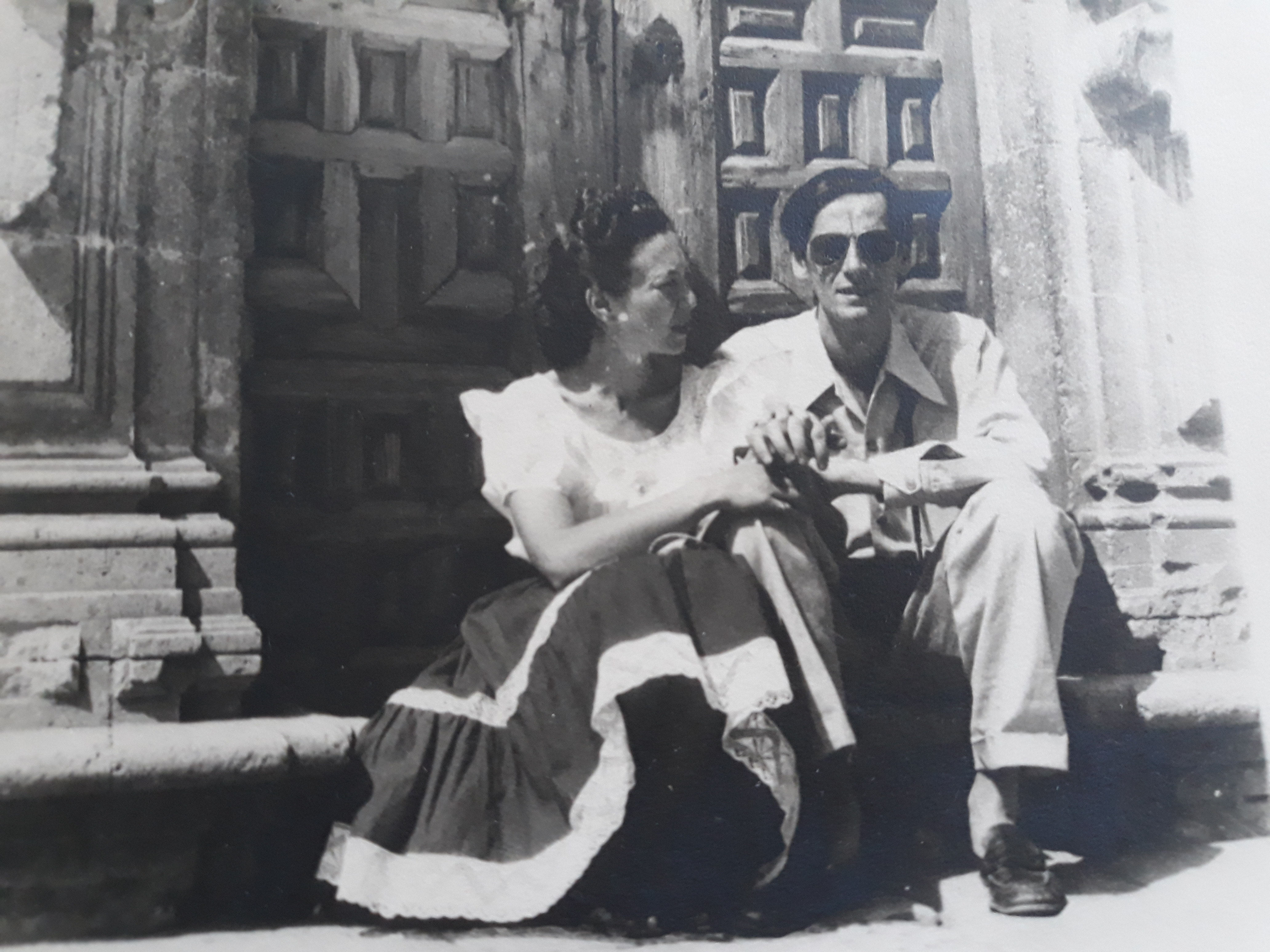 Pierre et Hélène Fisson au Mexique